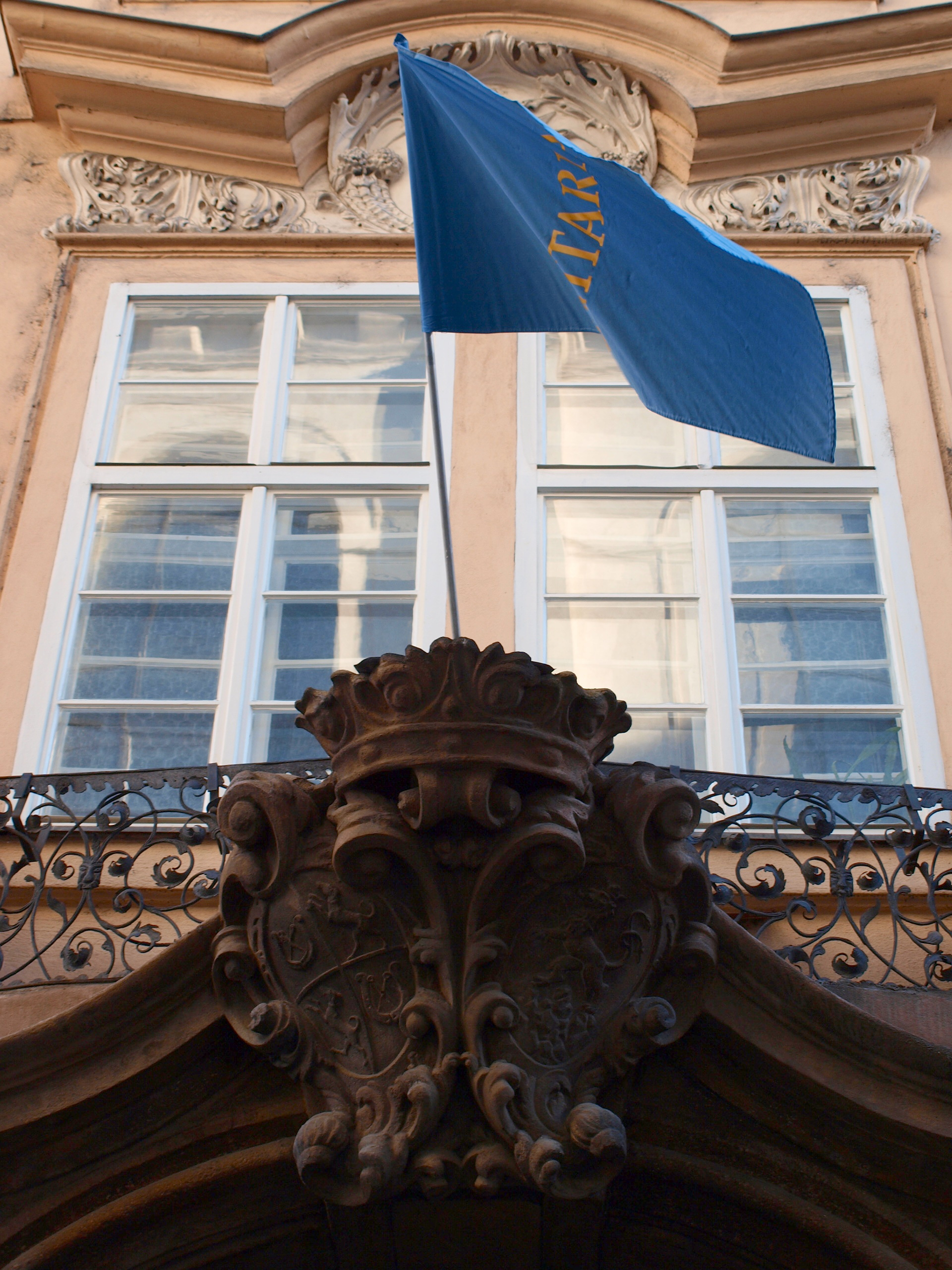 Pöttingovský palác